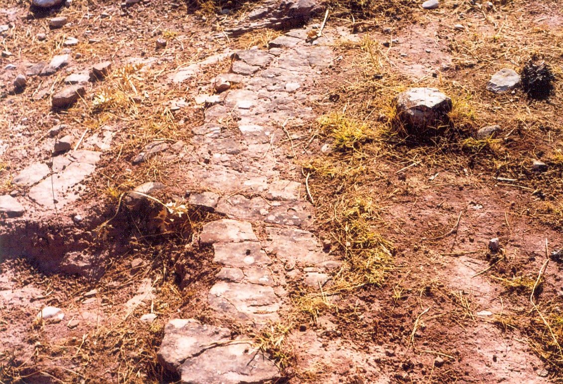 Detalle del camino del Paso, en Beas de Segura